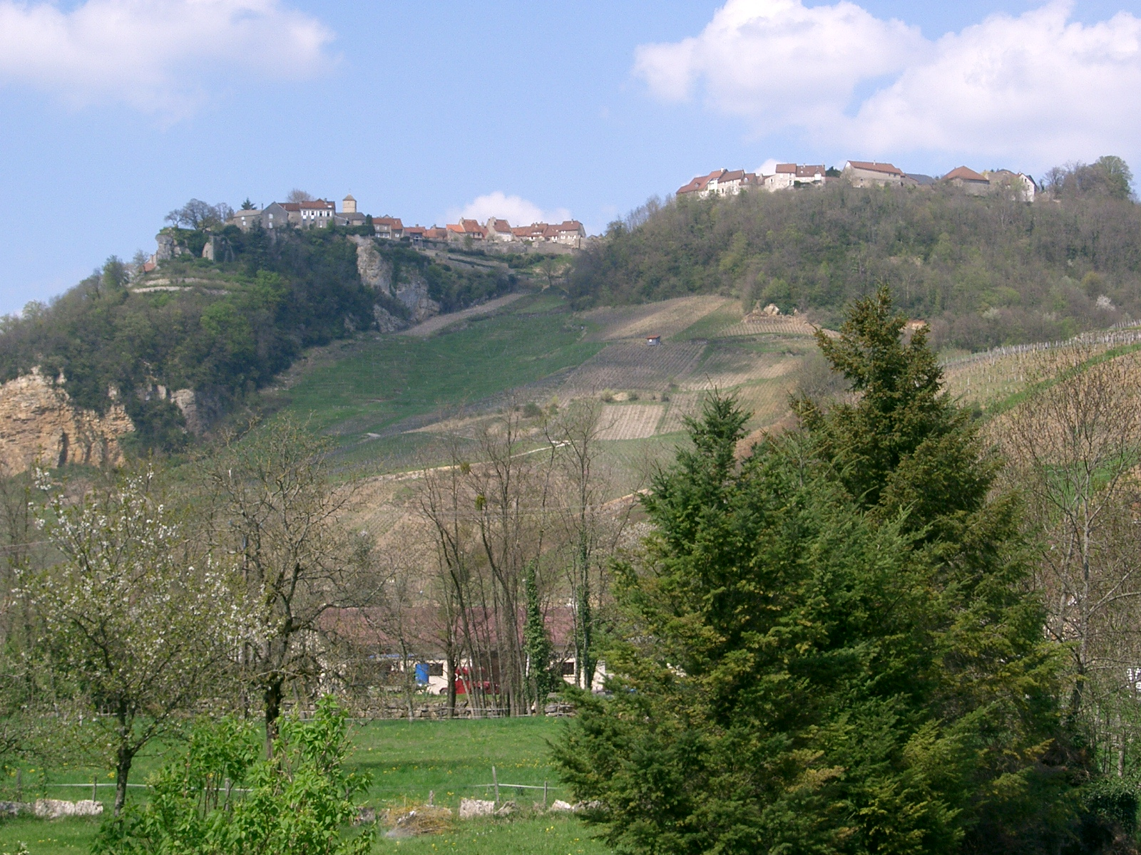 Château-Chalon vu depuis Nevy-sur-Seille